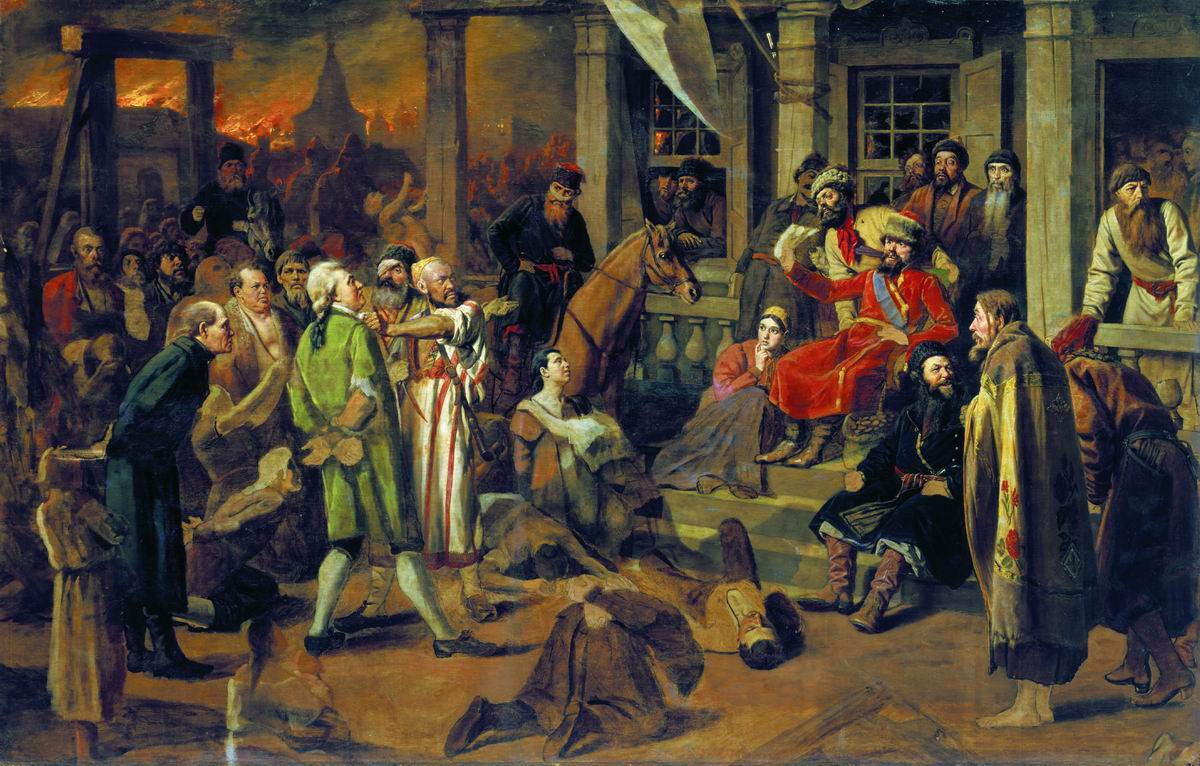 Суд Пугачева (ГИМ)